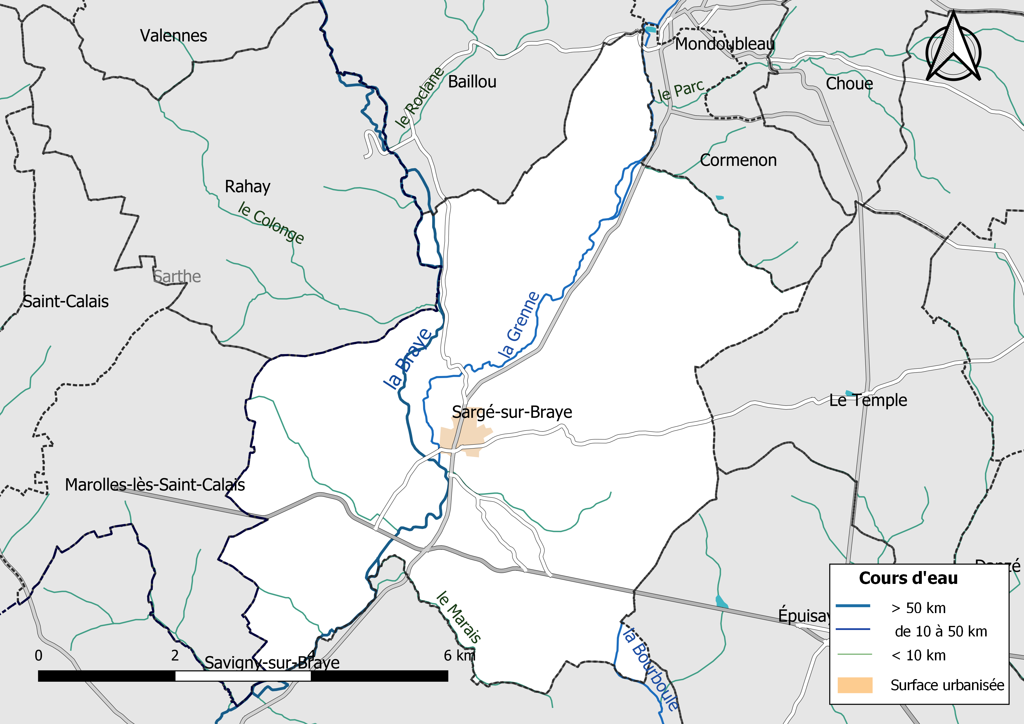 Carte du réseau hydrographique de la commune de Sargé-sur-Braye (Loir-et-Cher, France).